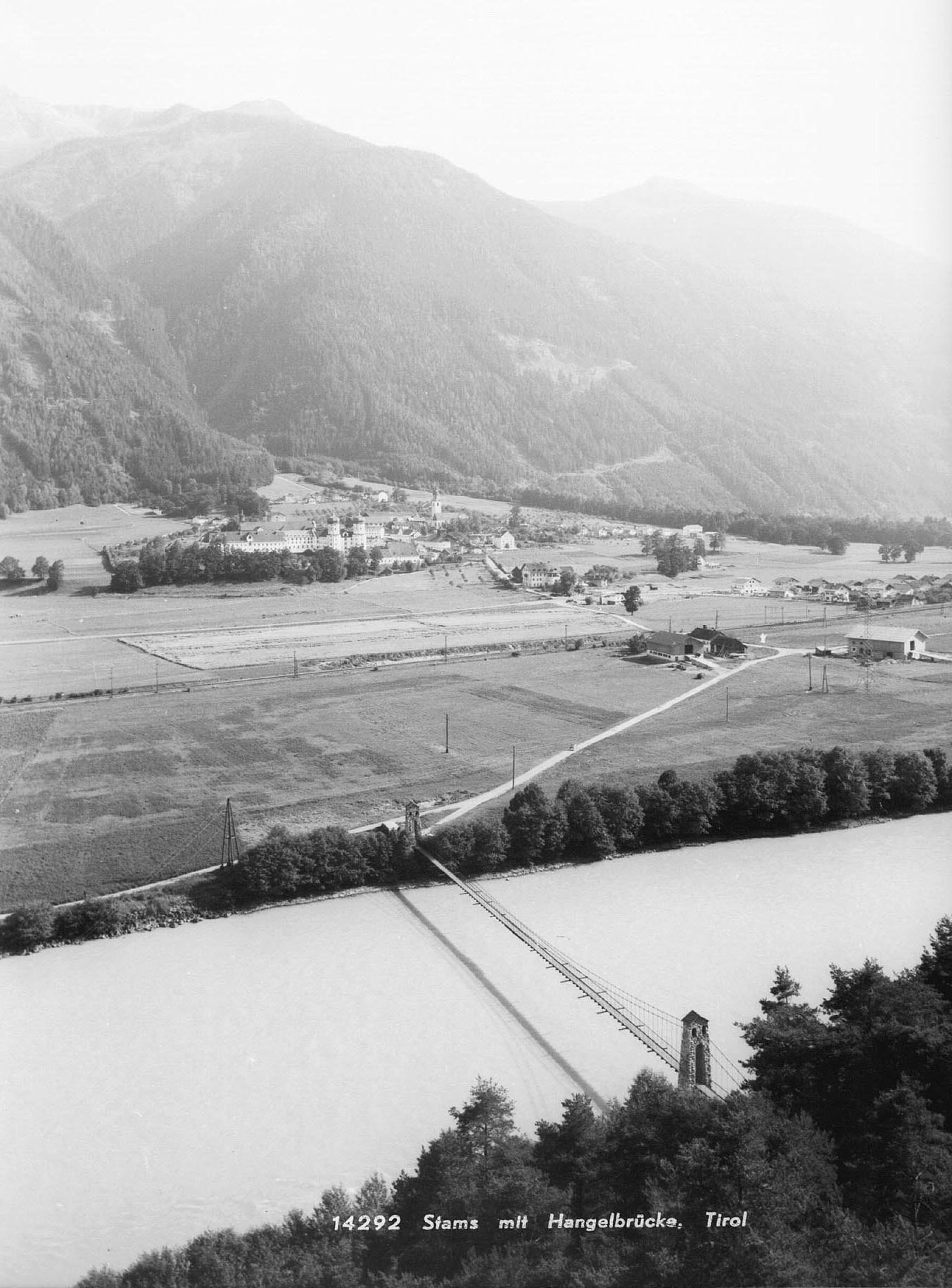 Stams mit Hangelbrücke / Tirol